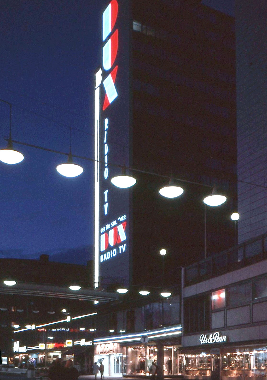 Hötorgsskrapa nr 1 med "DUX"-reklam novemnber 1986